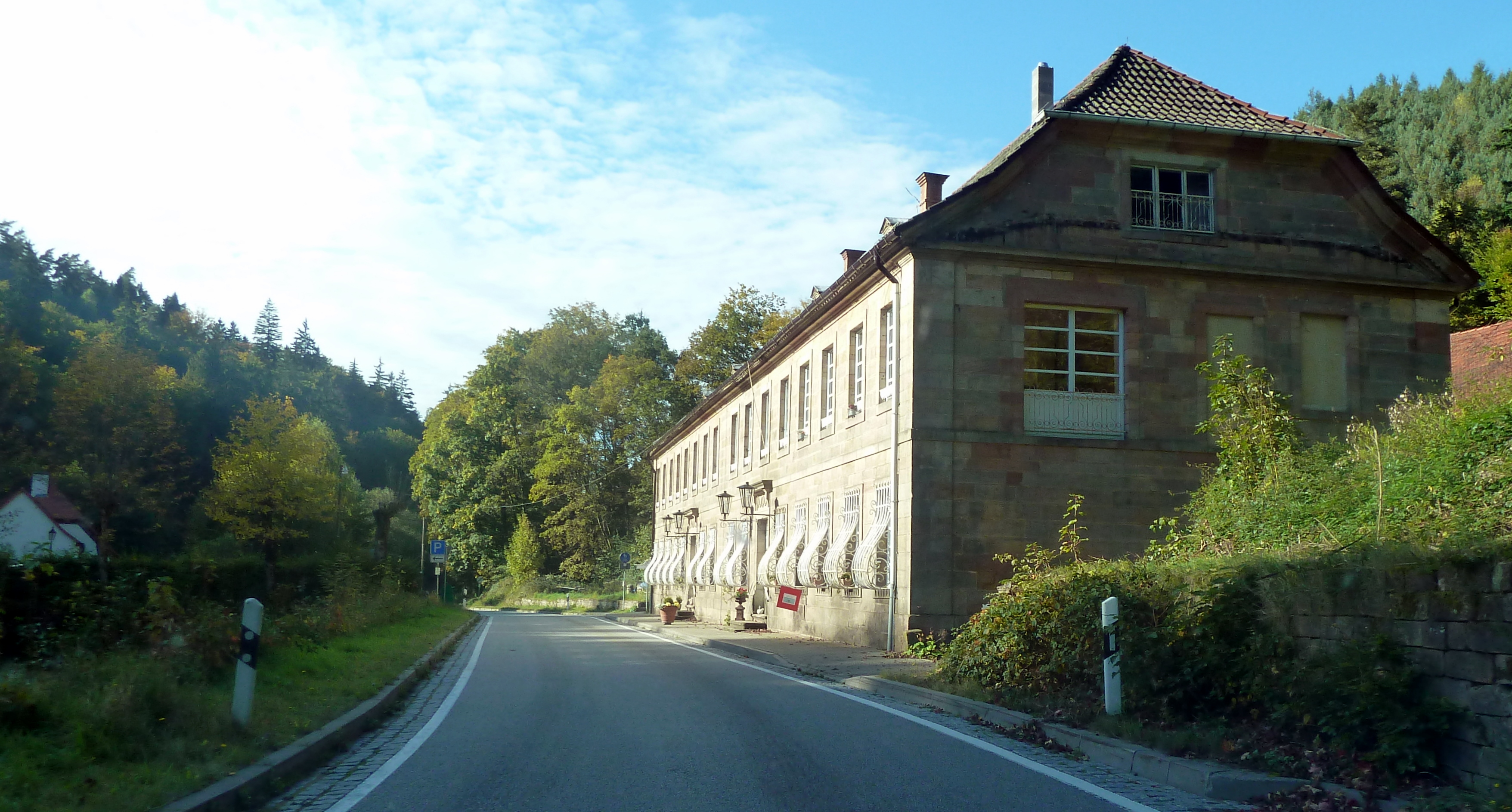 Trippstadt - Unterhammer im Karlstal – hier war früher ein Eisenhammerwerk